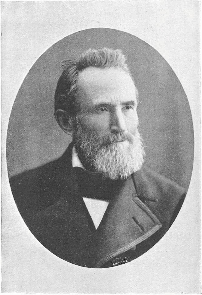 Portrait von Ernst Georg Gladbach, aus dem Nekrolog (1897)